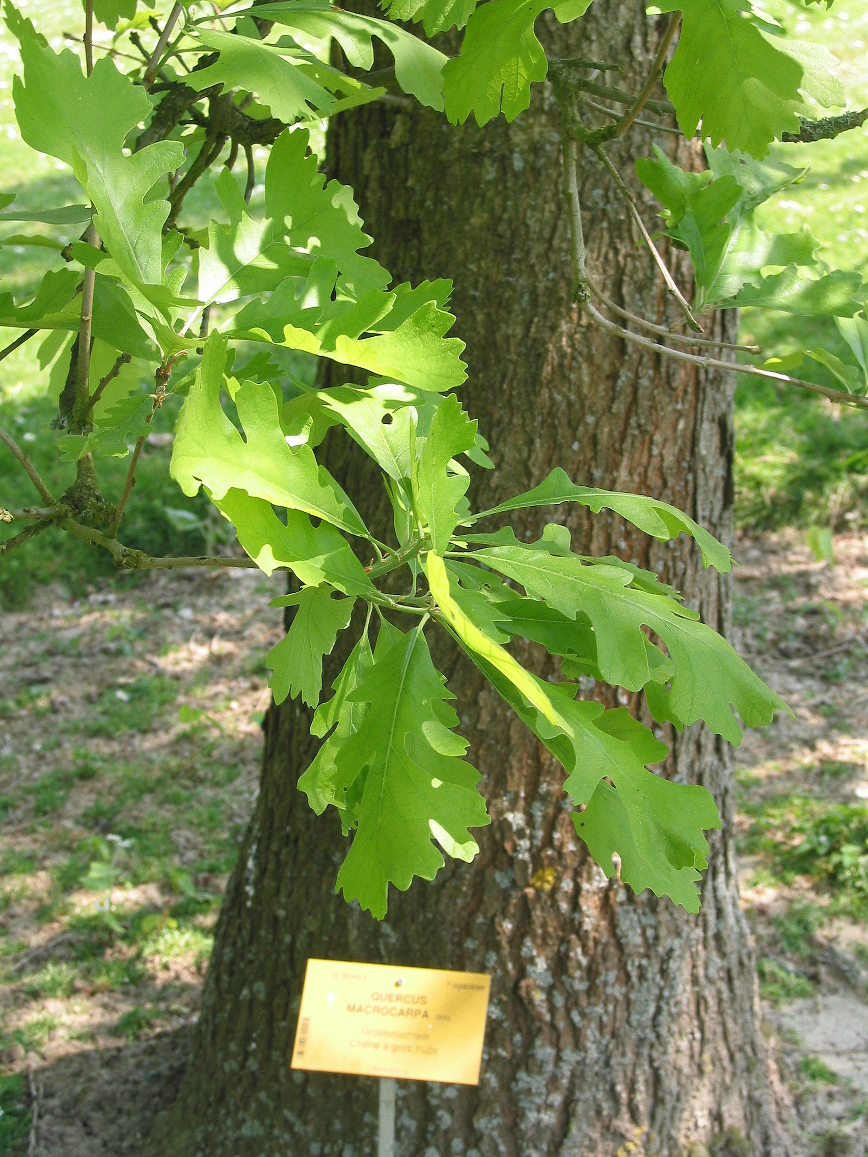 Chêne à gros fruits (Quercus macrocarpa)